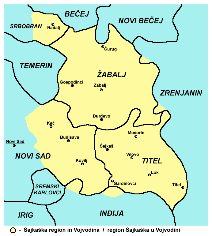 Map of Šajkaška region in Vojvodina, Serbia.Mapa regiona Šajkaška u Vojvodini, Srbija.Carte de la région de la Šajkaška, Voïvodine, Serbie.